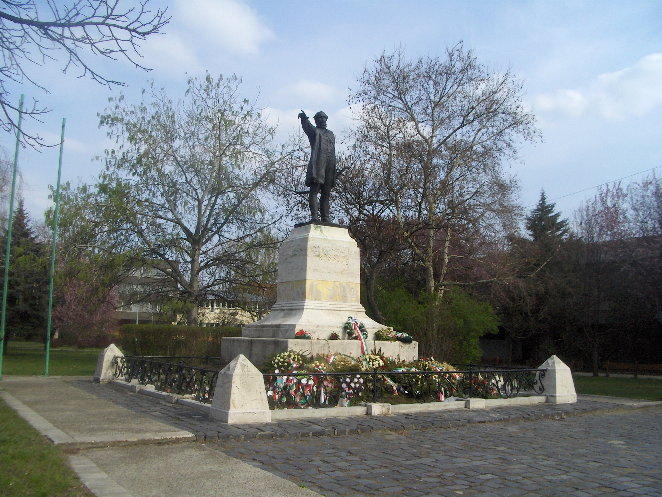 Kossuth-szobor Orosházán. Alkotó: Horvay János (1904) Restaurátor: Rajki László (2002)